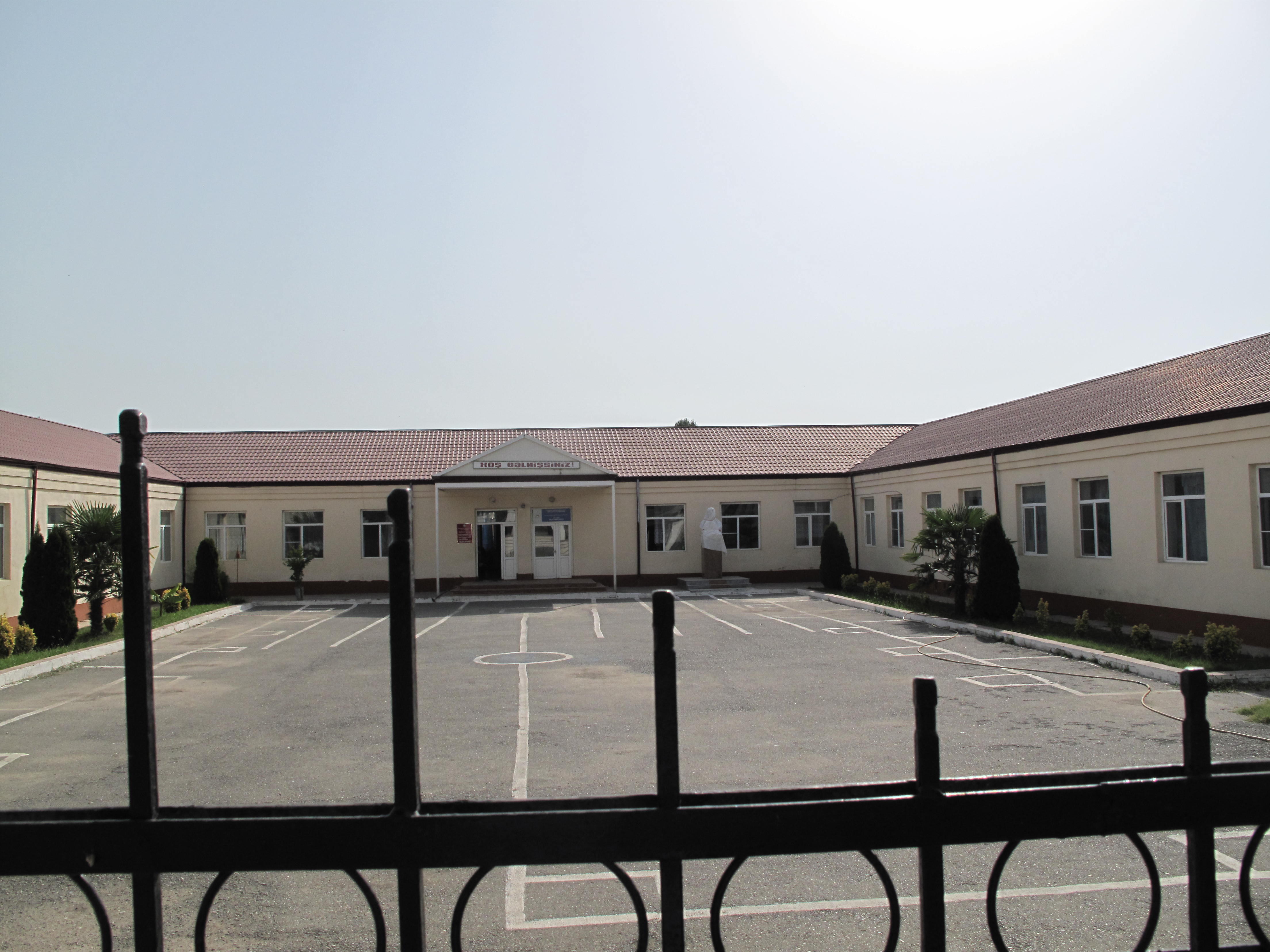 Bərdə rayonu Yasif Kərimov adına Yeni Daşkənd kənd tam orta məktəbi